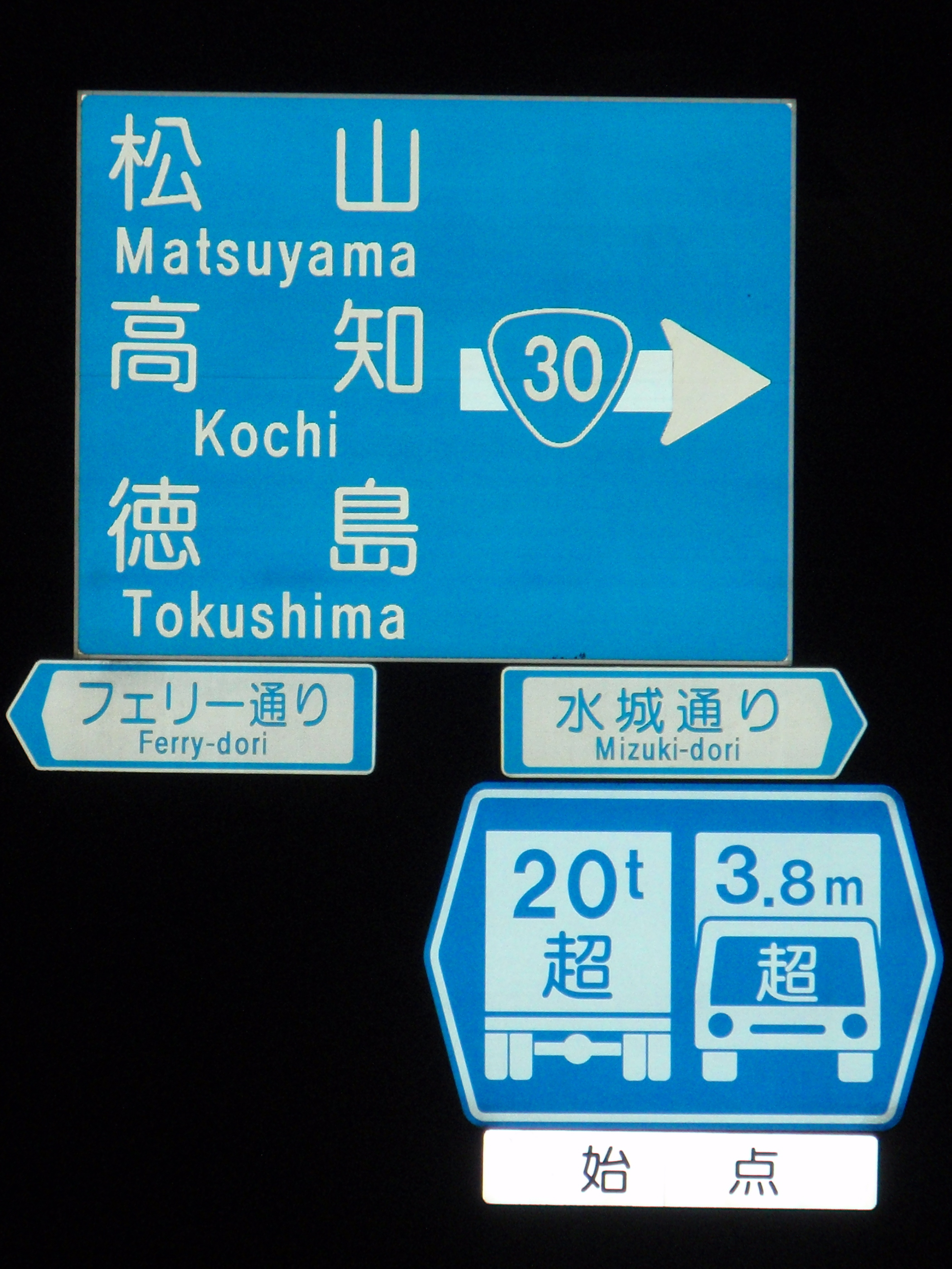 香川県高松市北浜町の宇高国道フェリー前交差点にある国道30号の四国側起点部分の案内看板。当地を除く四国の県庁所在地が全て記載されている。